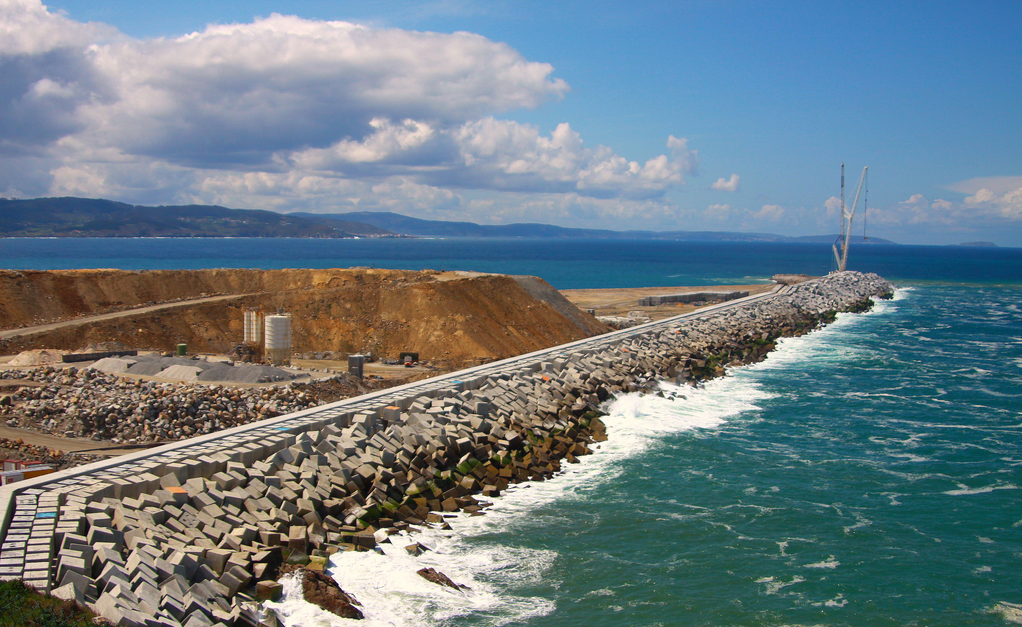 Obras do porto exterior da Coruña, Galiza